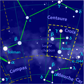 Carte pour la constellation Croix Produite à l'aide du logiciel PP3